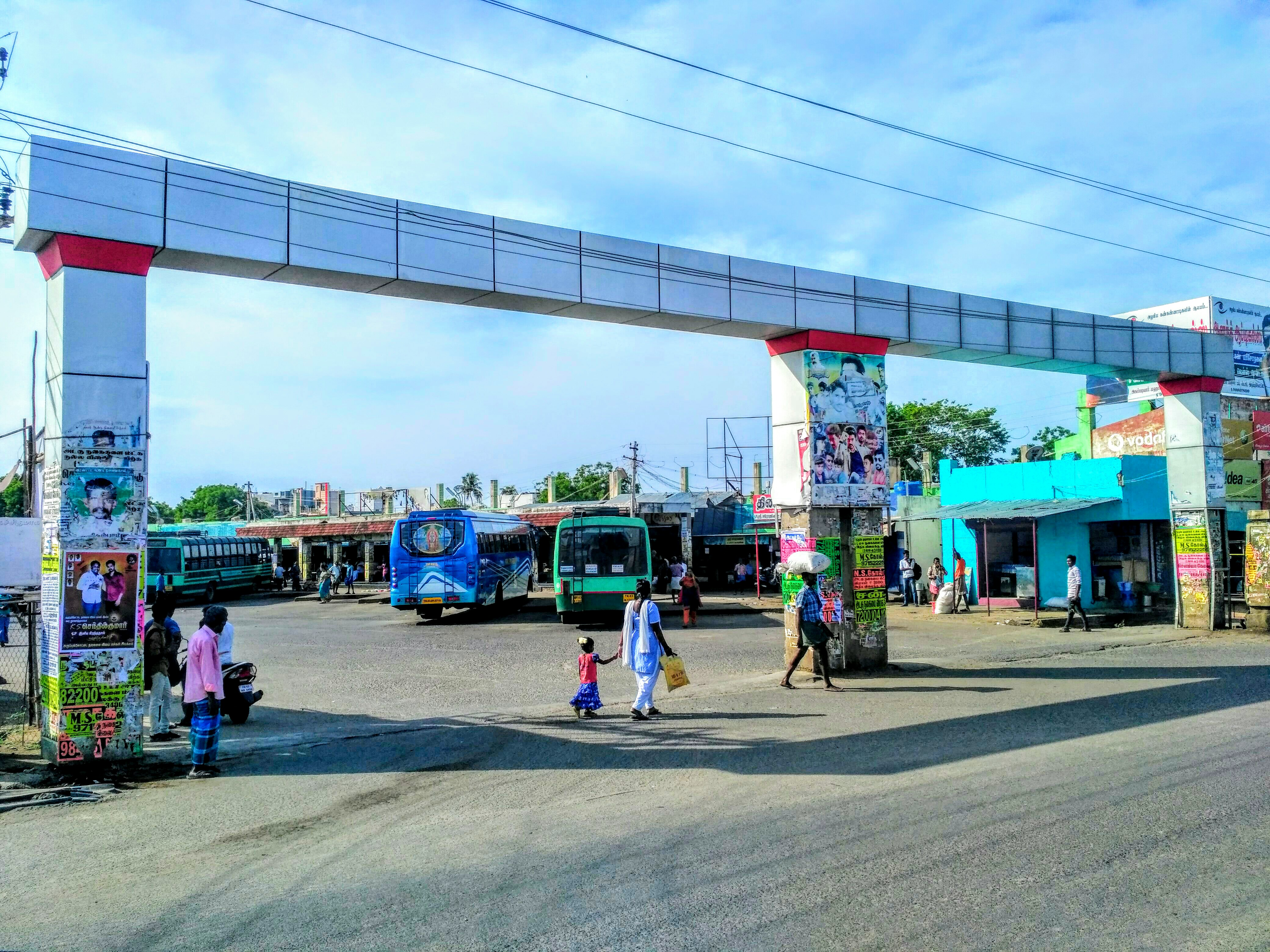 அருப்புக்கோட்டை புதிய பேருந்து நிலையத்தின் நுழைவாயில் ..